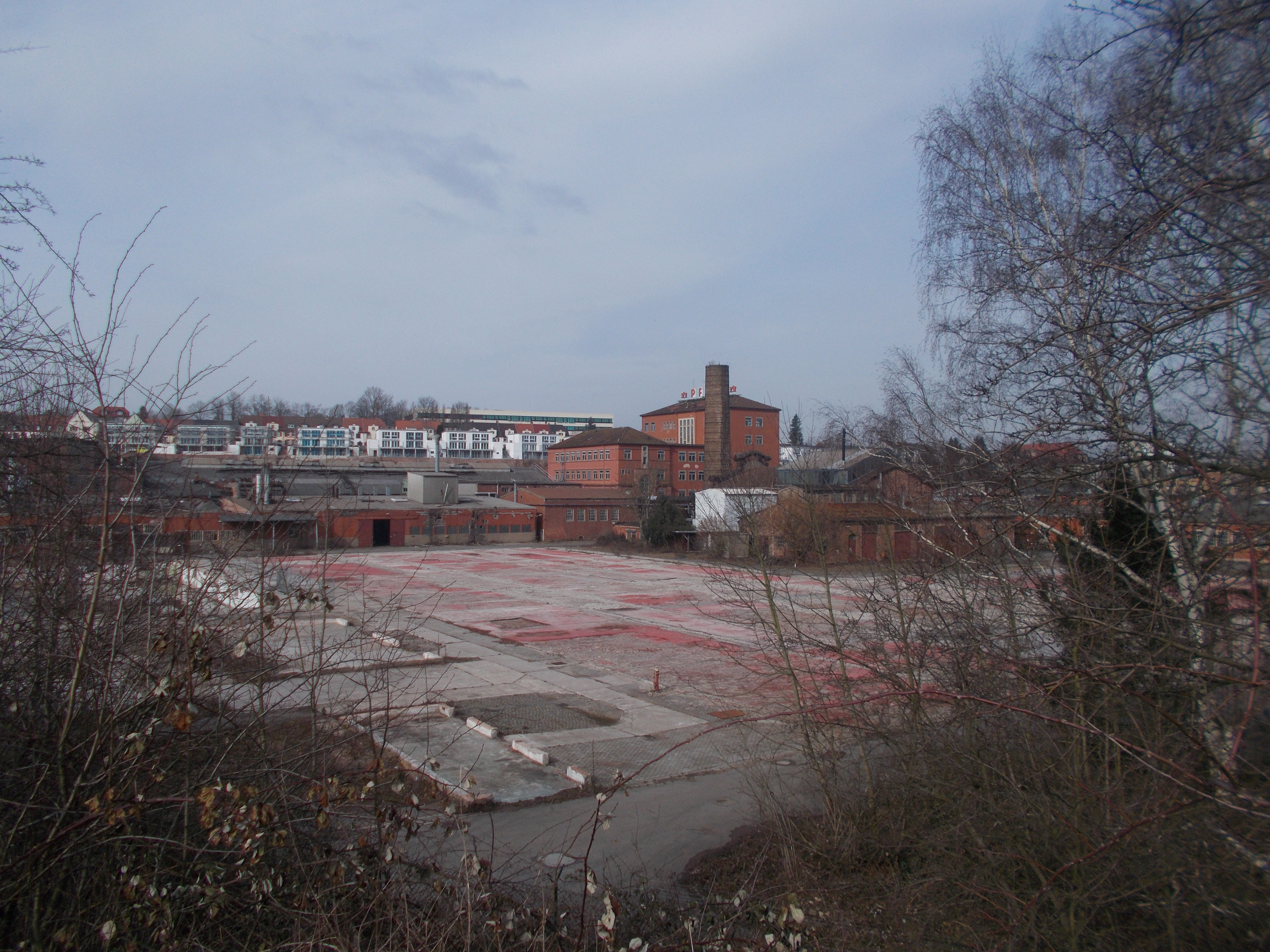 Teilsaniertes Pfaffgelände, teilweise Denkmalzone, ehemalige Nähmaschinenfabrik in Kaiserslautern